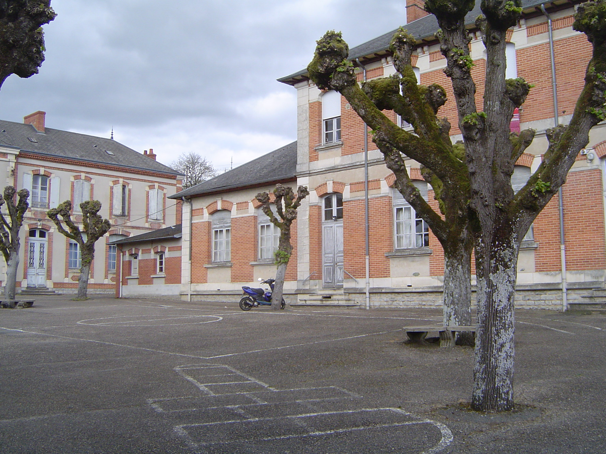 Bourbon-Lancy (établissement scolaire 4)